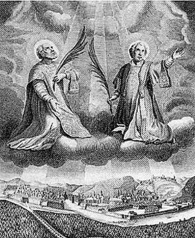 Ferjeux et Ferreol de Besançon.